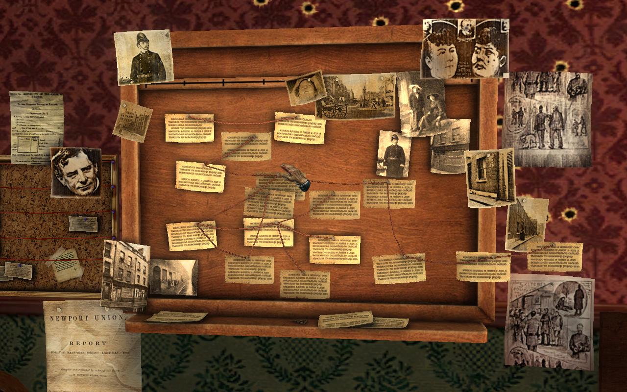 Capture d'écran du jeu Sherlock Holmes contre Jack l'Éventreur. Il s'agit du mur du 221b, Baker Street, sur lequel ont été épinglées de nombreuses photos liées aux meurtres de Whitechapel.